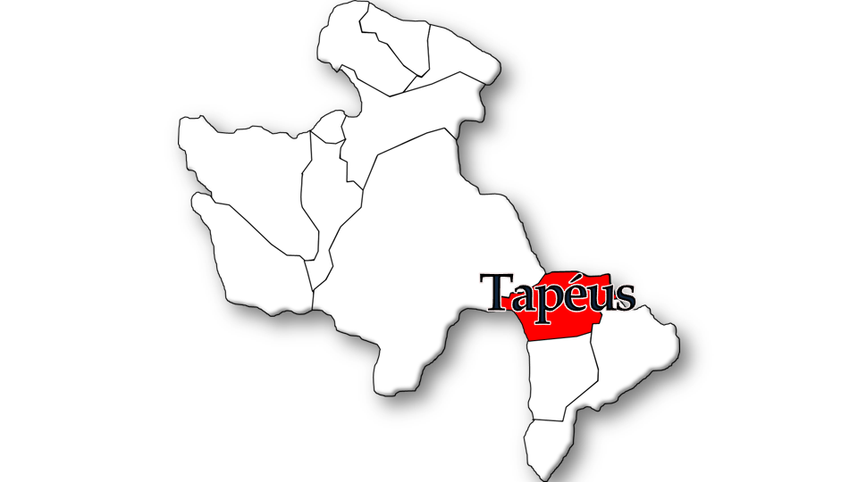 População